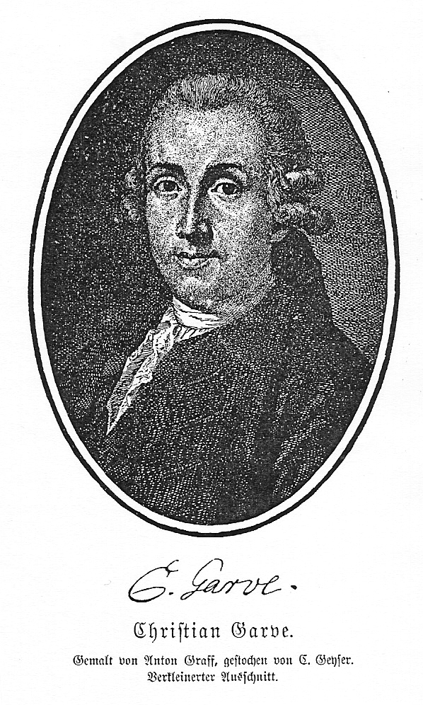 Christian Garve (1742-1798) Das Bild stammt aus Bilderatlas zur Geschichte der deutschen Nationallitteratur von Gustav Könnecke. Zweite, verbesserte und vermehrte Auflage. Marburg: Elwert 1895. Für Wikipedia eingescannt und zur Verfügung gestellt von --Goerdten 22:40, 24. Nov. 2006 (CET)